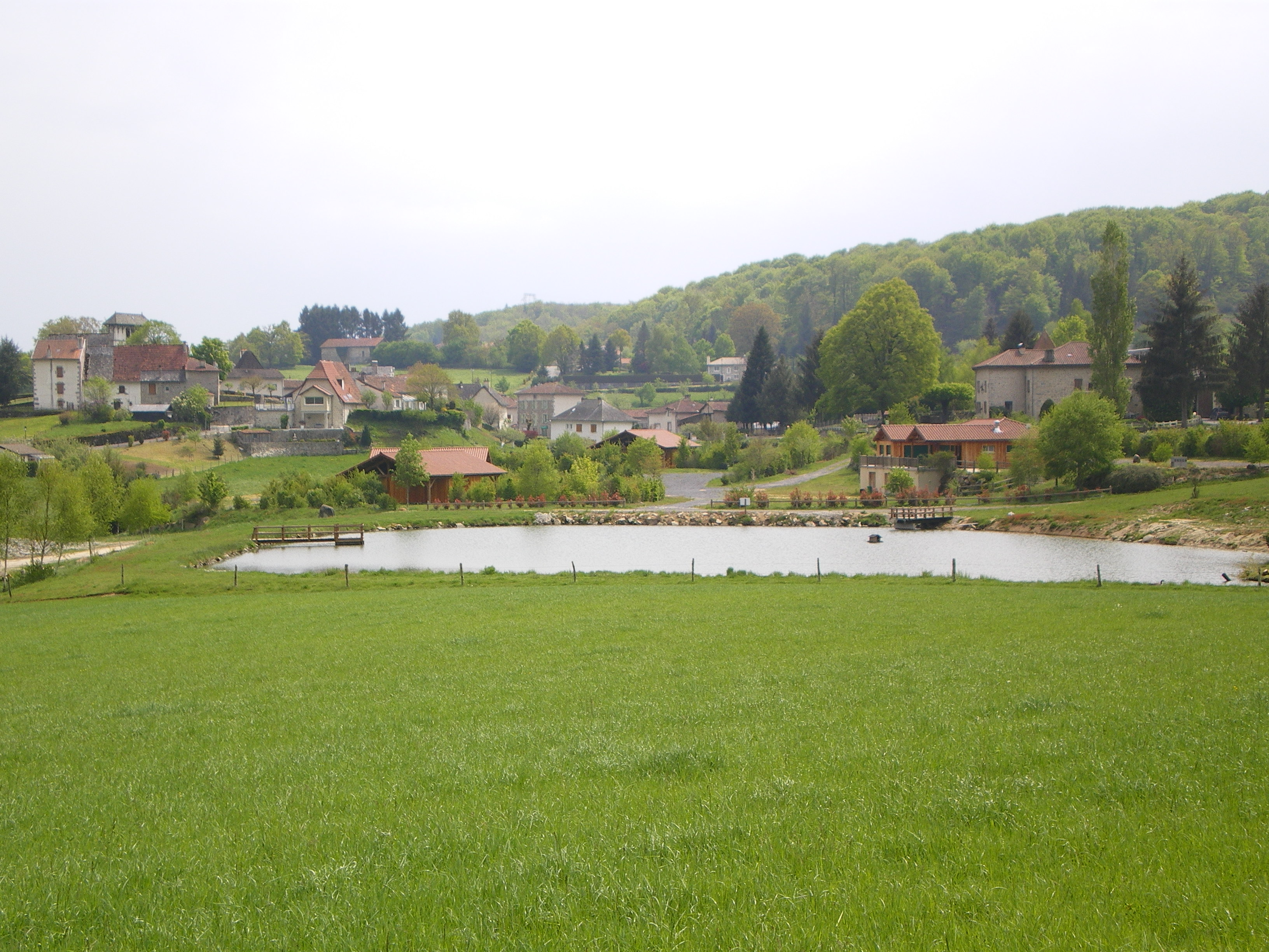 Pers, Cantal, France